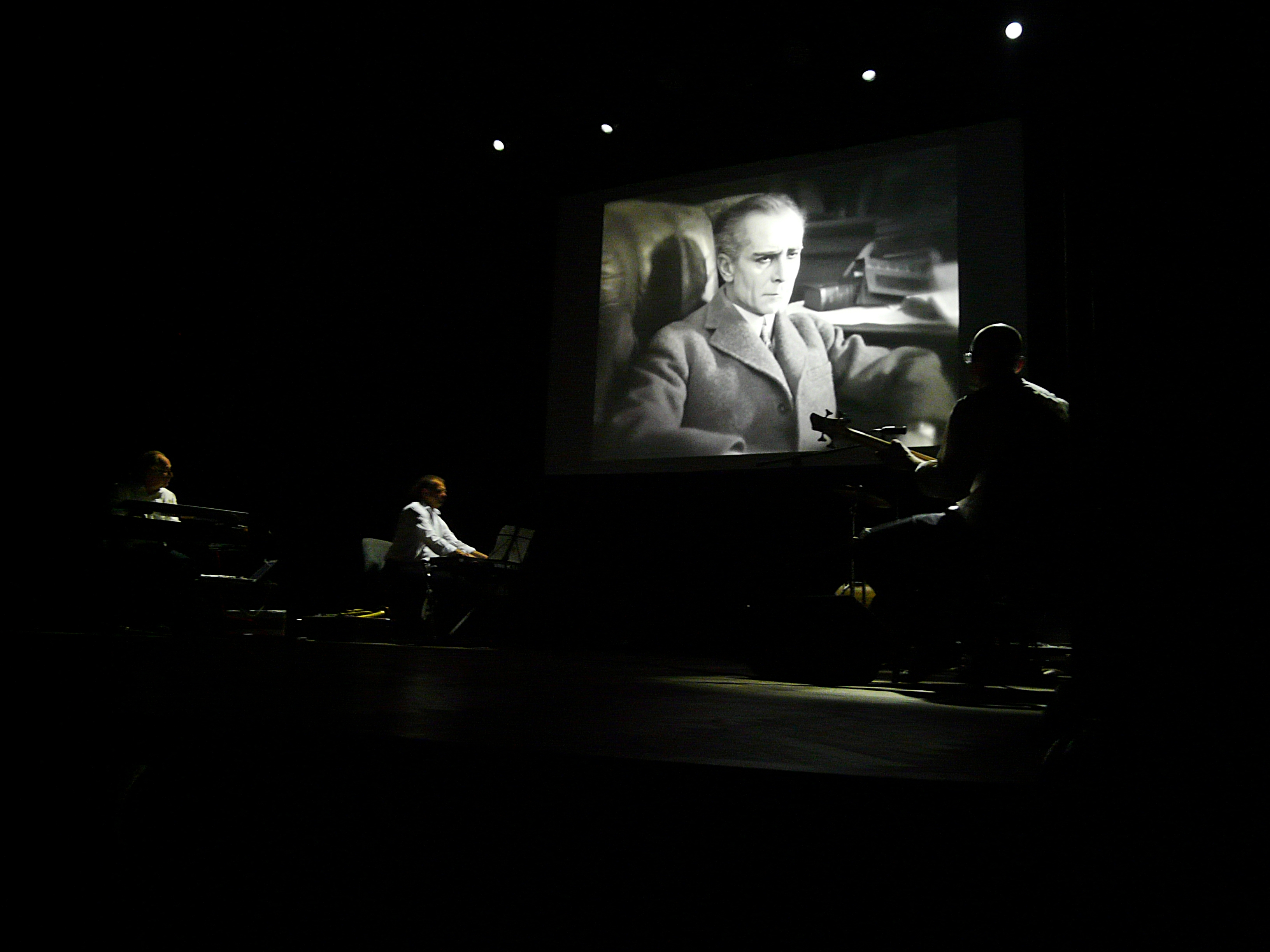 Czerwie – folkowy zespół muzyczny. Występ z 22 sierpnia 2020r. na Ambient Festiwal w Gorlicach. Muzyka na żywo do filmu "Metropolis" z 1927r.